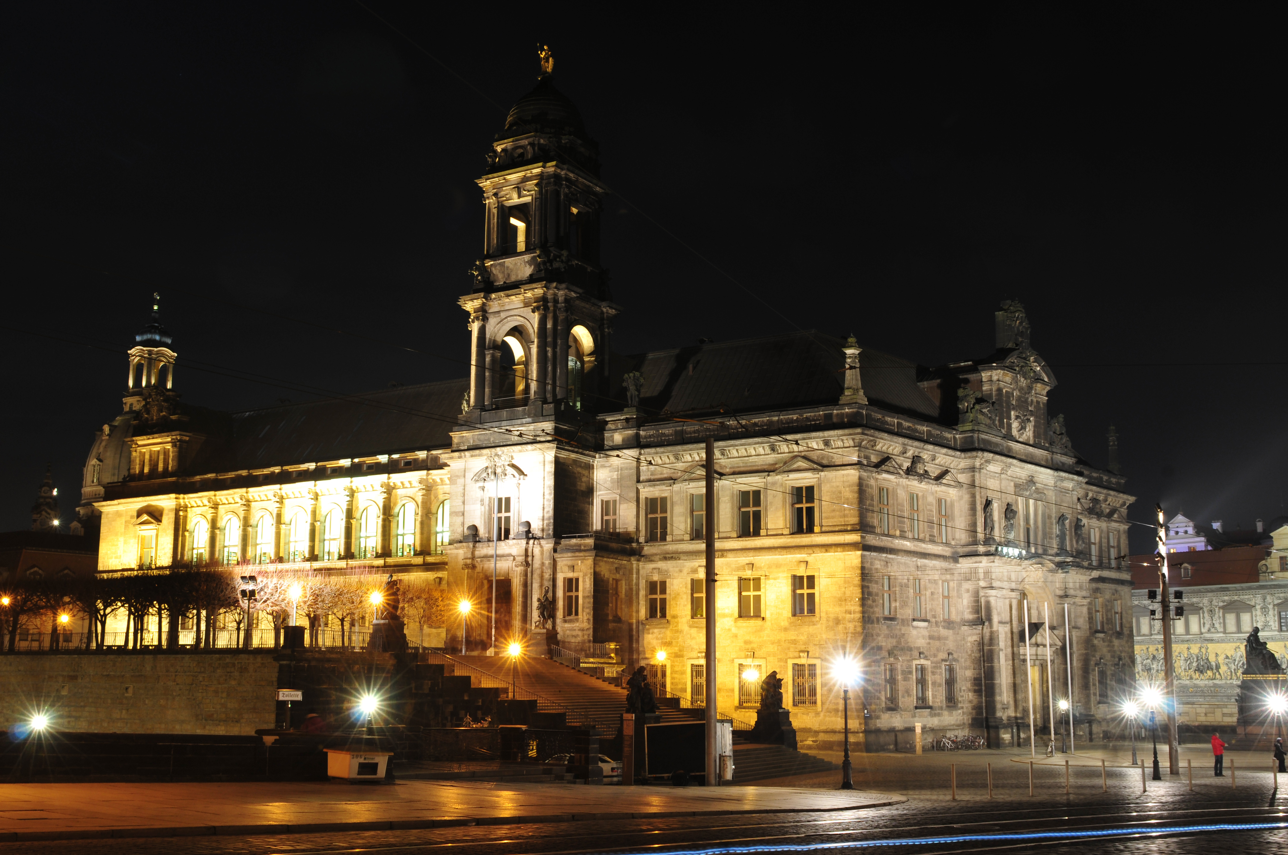 Dresden, Sächsisches Ständehaus und Aufgang zur Brühlschen Terrasse am Schlossplatz